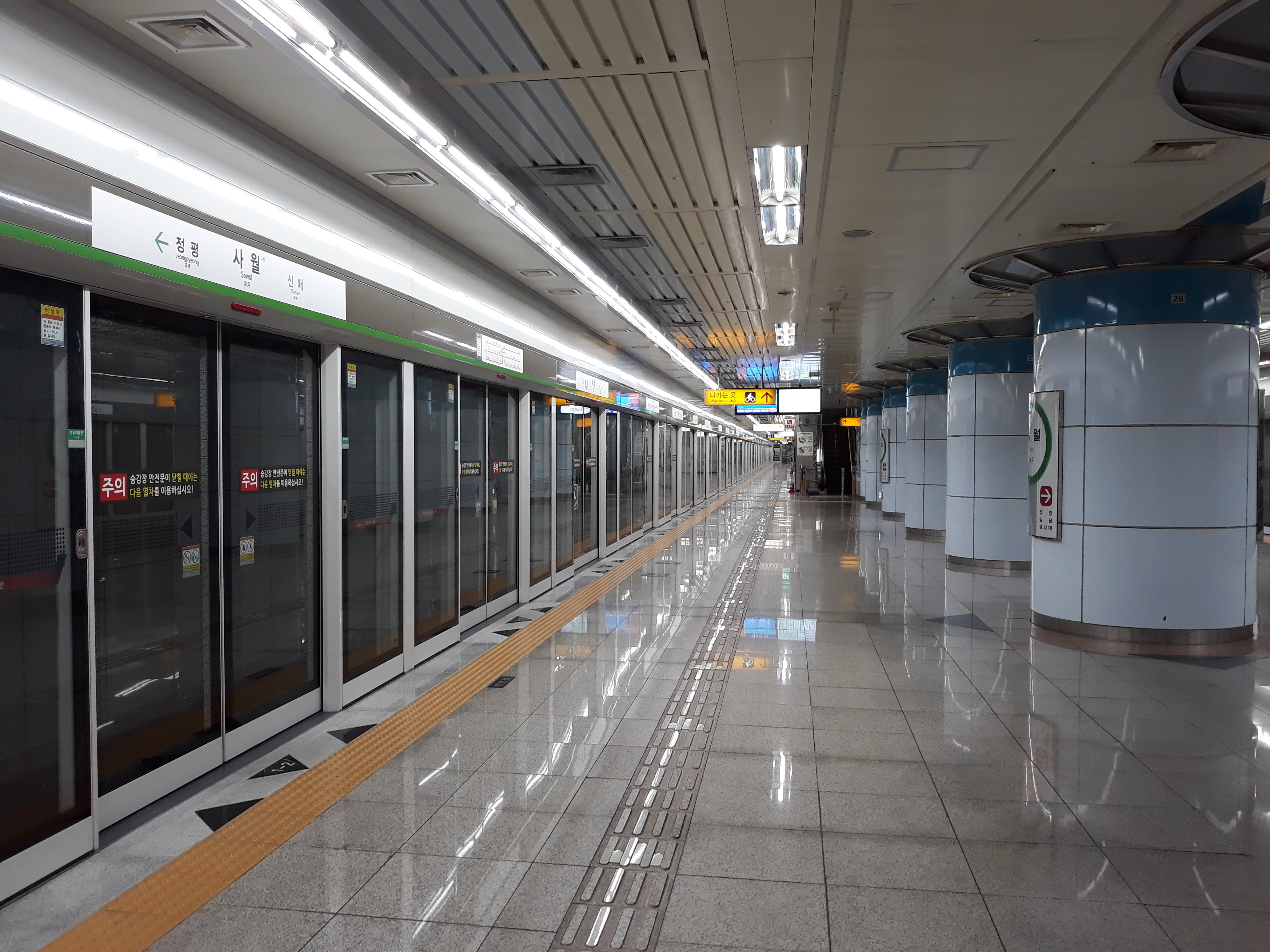 대구 도시철도 2호선 사월역 영남대 방면 승강장